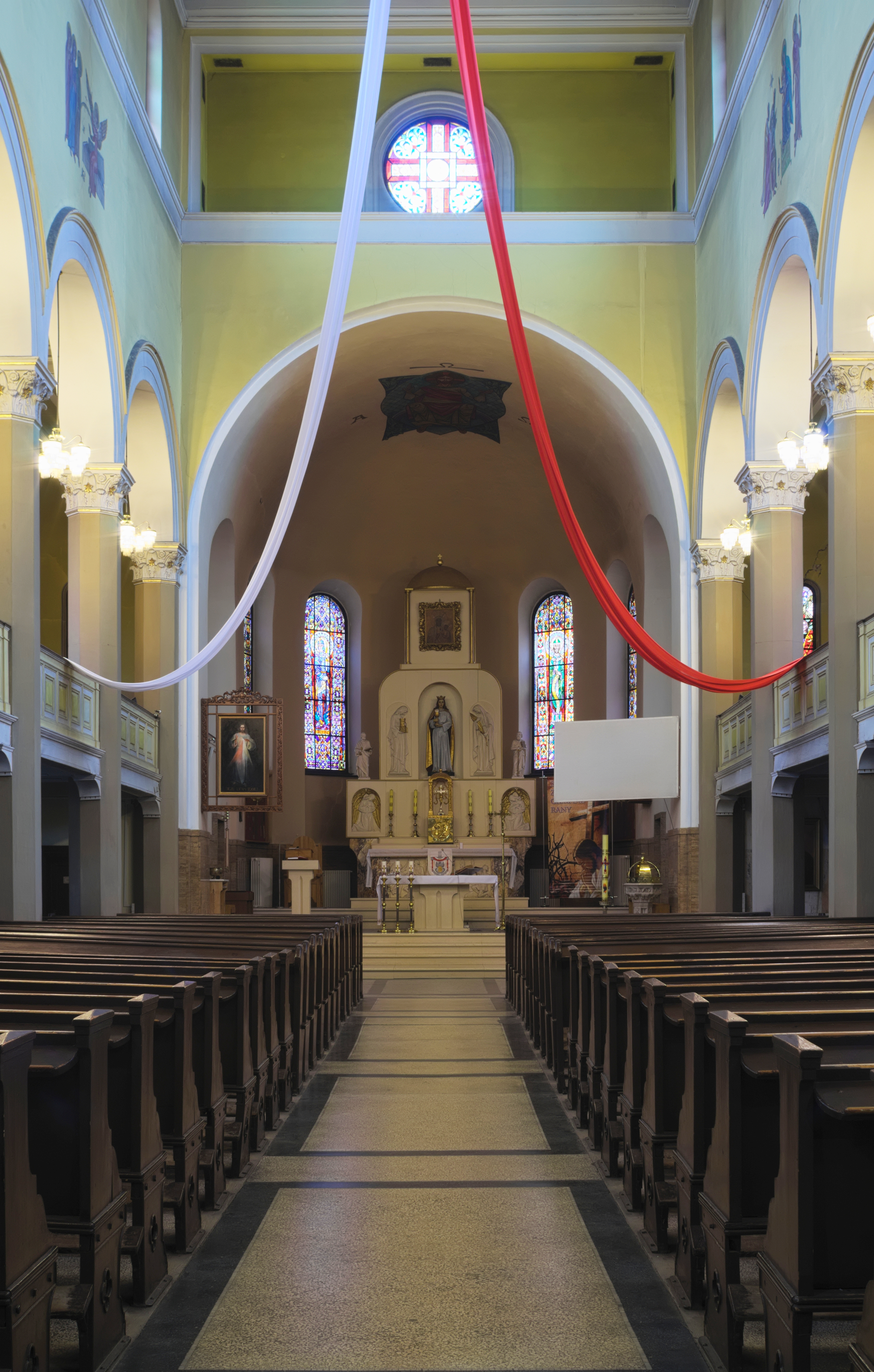 wnętrze kościoła św. Barbary w Gliwicach